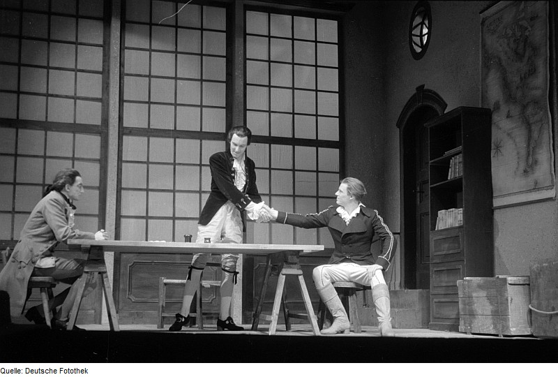 Original image description from the Deutsche Fotothek Szenenbilder